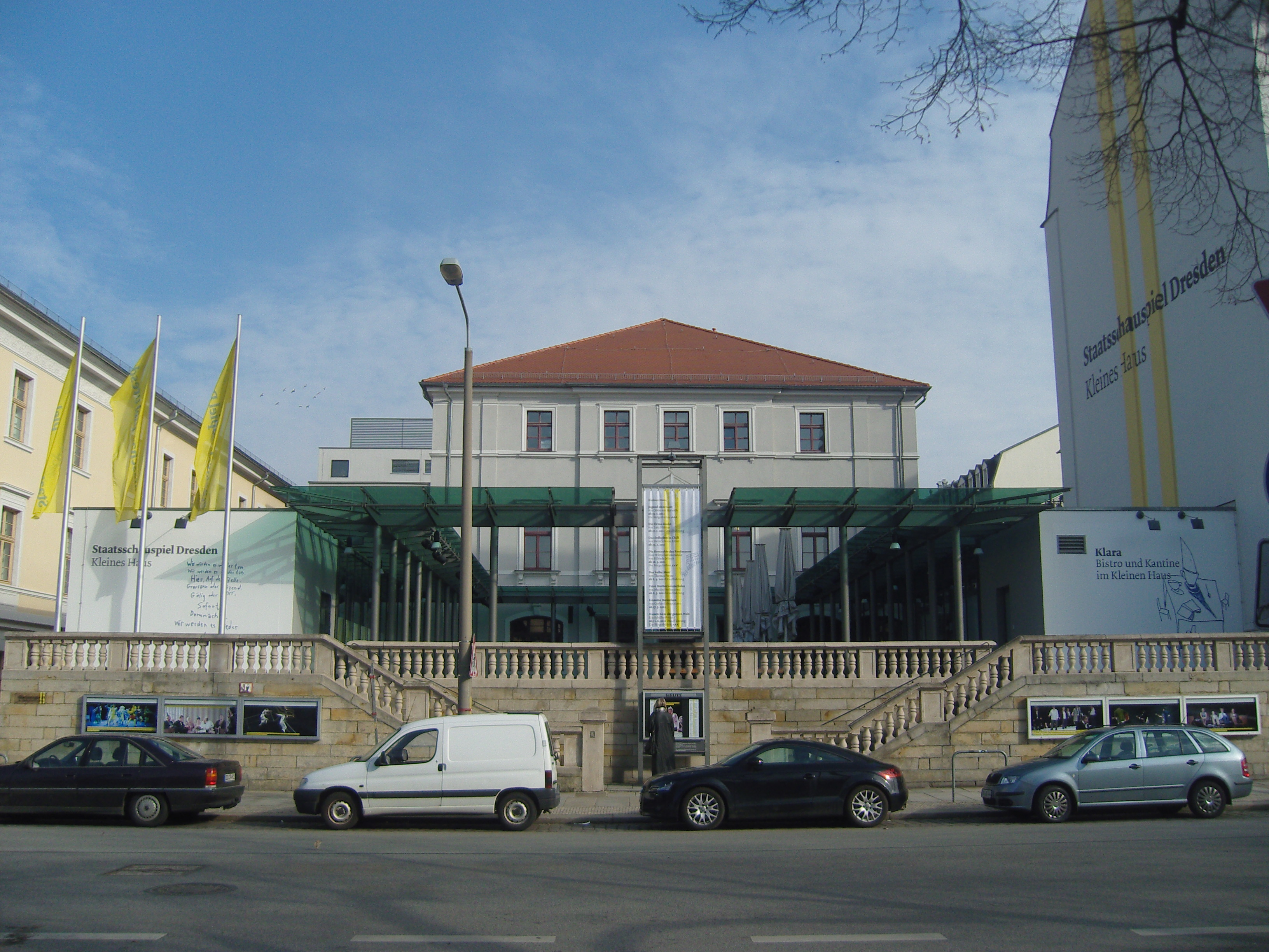 denkmalgeschütztes "Kleines Haus" in der Glacisstraße 28, Dresden